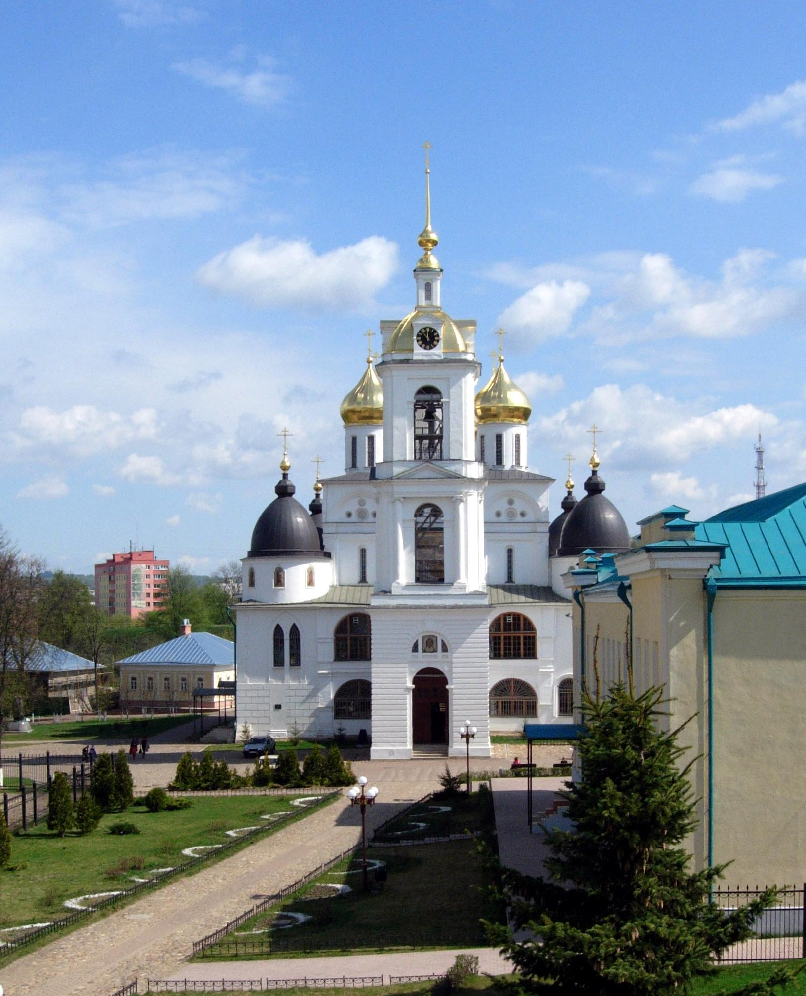 Собор Успения Пресвятой Богородицы (Дмитров)